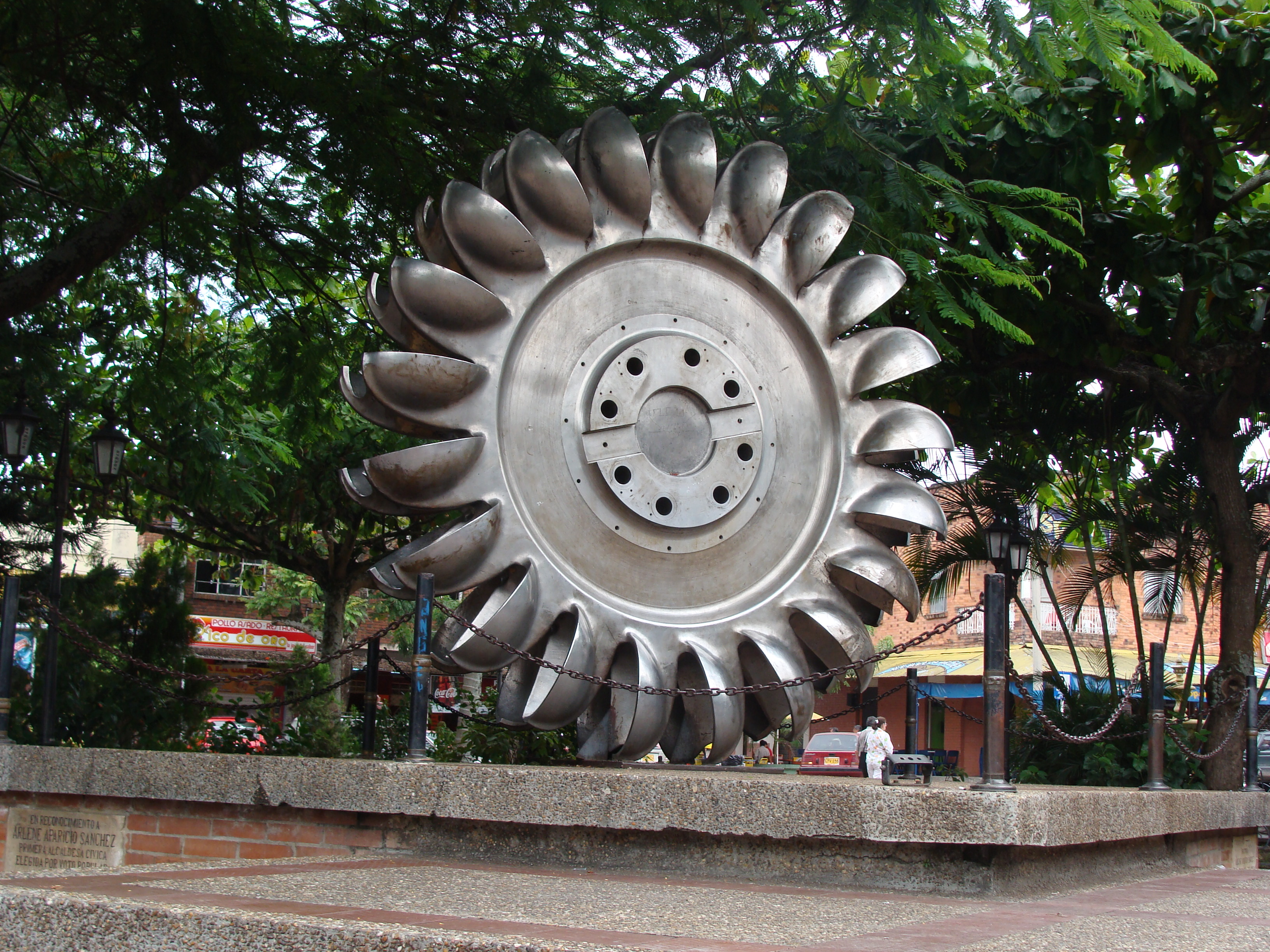 Ubicación: EL COLEGIO, CUNDINAMARCA